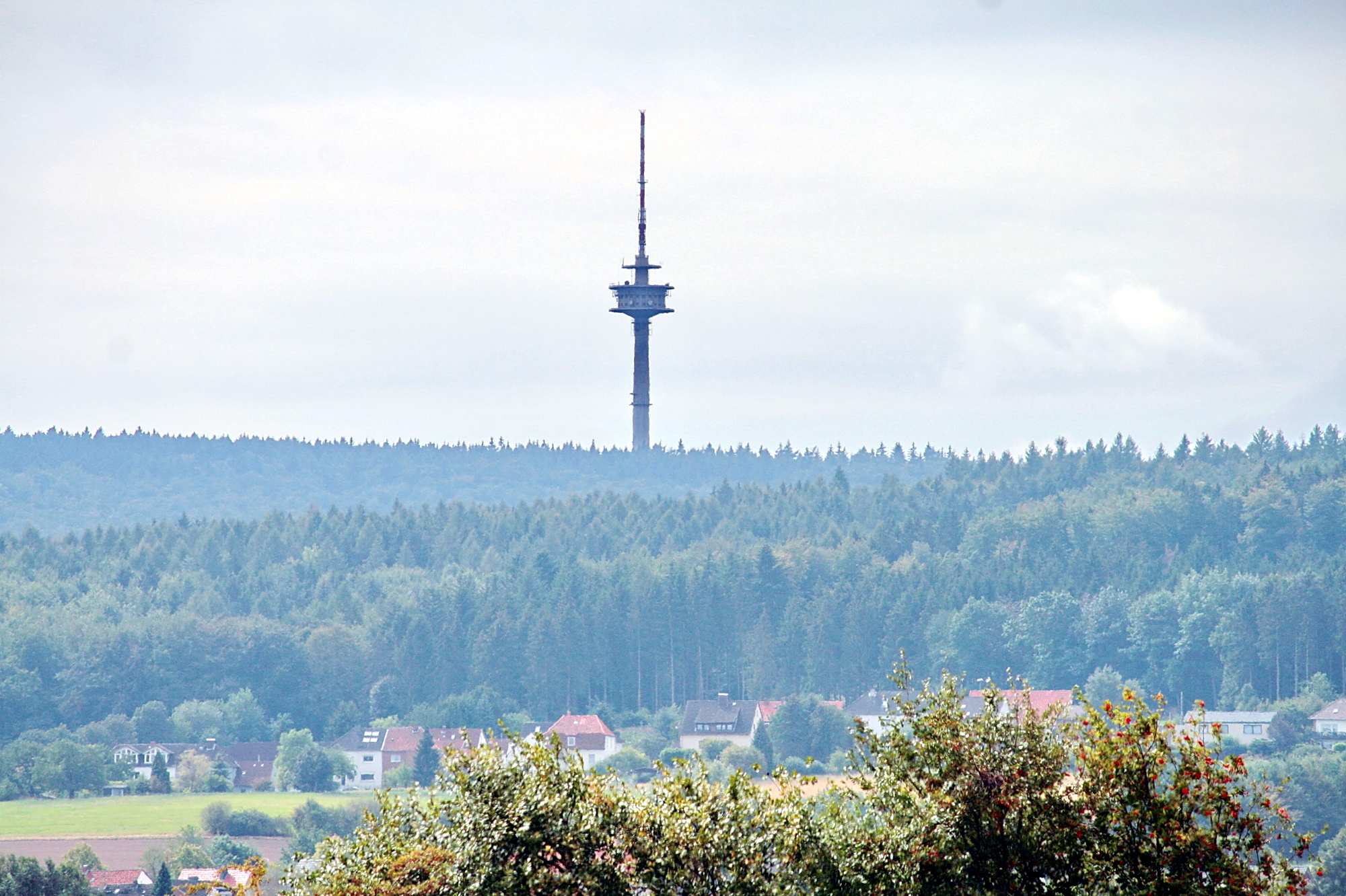 Fernmeldeturm Barsinghausen, Niedersachsen, Deutschland